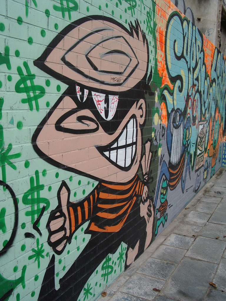 Ściana oferuje afordancję ekspresji swoich walorów artystycznych.Grafitti